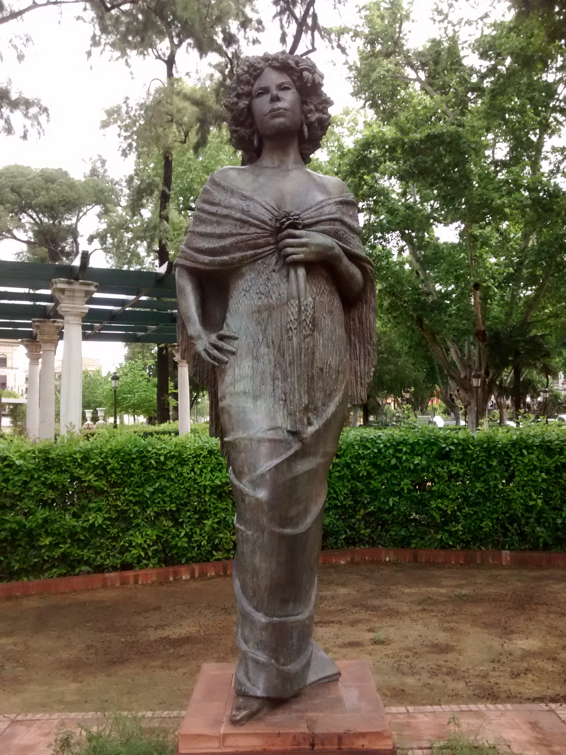 Monumento a la Duquesa de Alba en Sevilla.